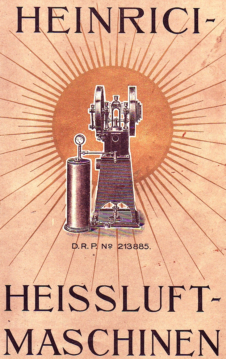 Katalog